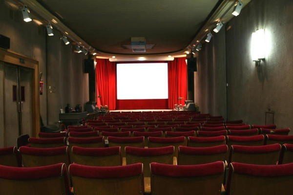 Salle de Projection de la Cinémathèque Robert Lynen